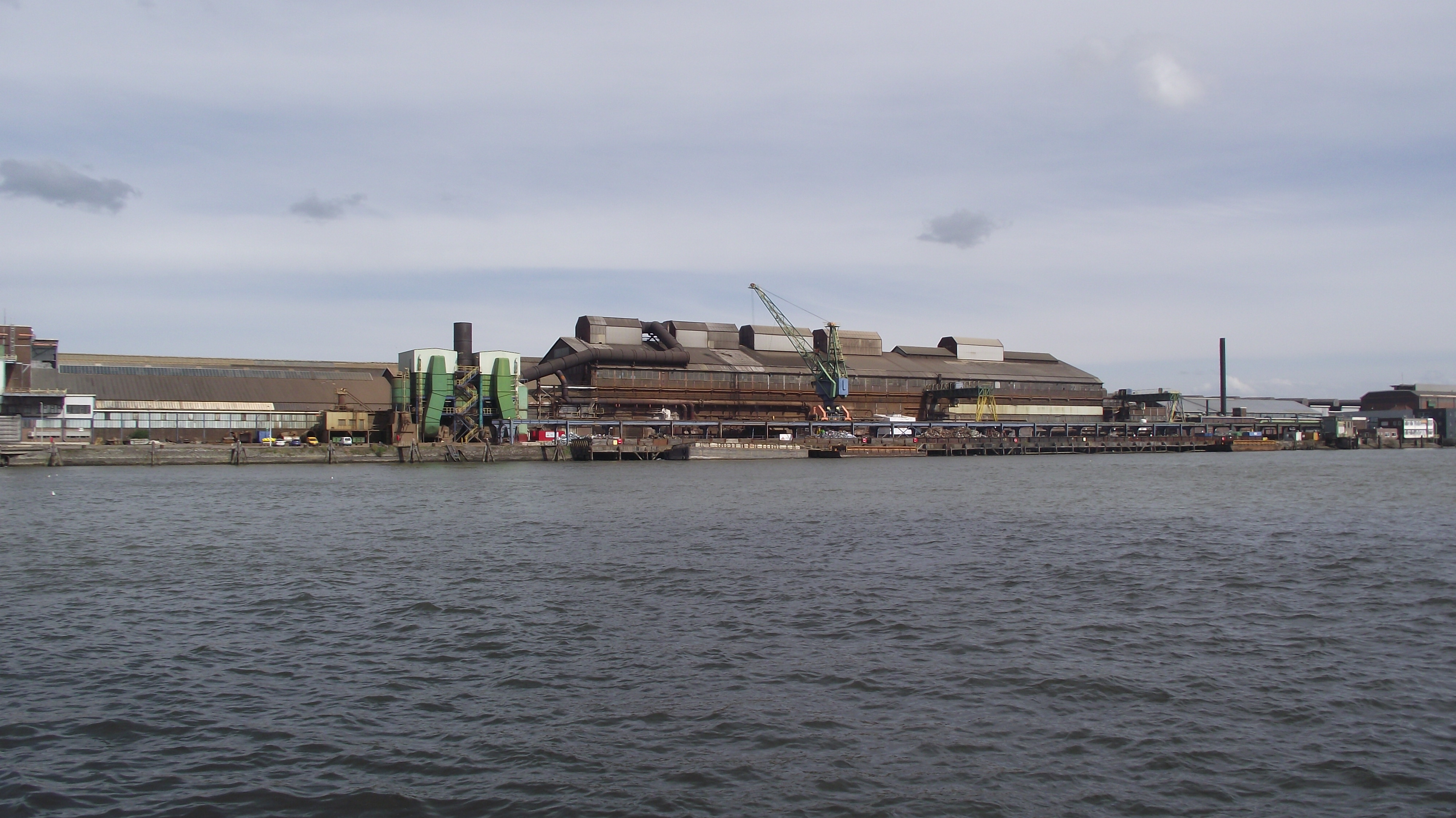 Schroot verwerkingsbedrijf Nedstaal langs de Noord in Alblasserdam